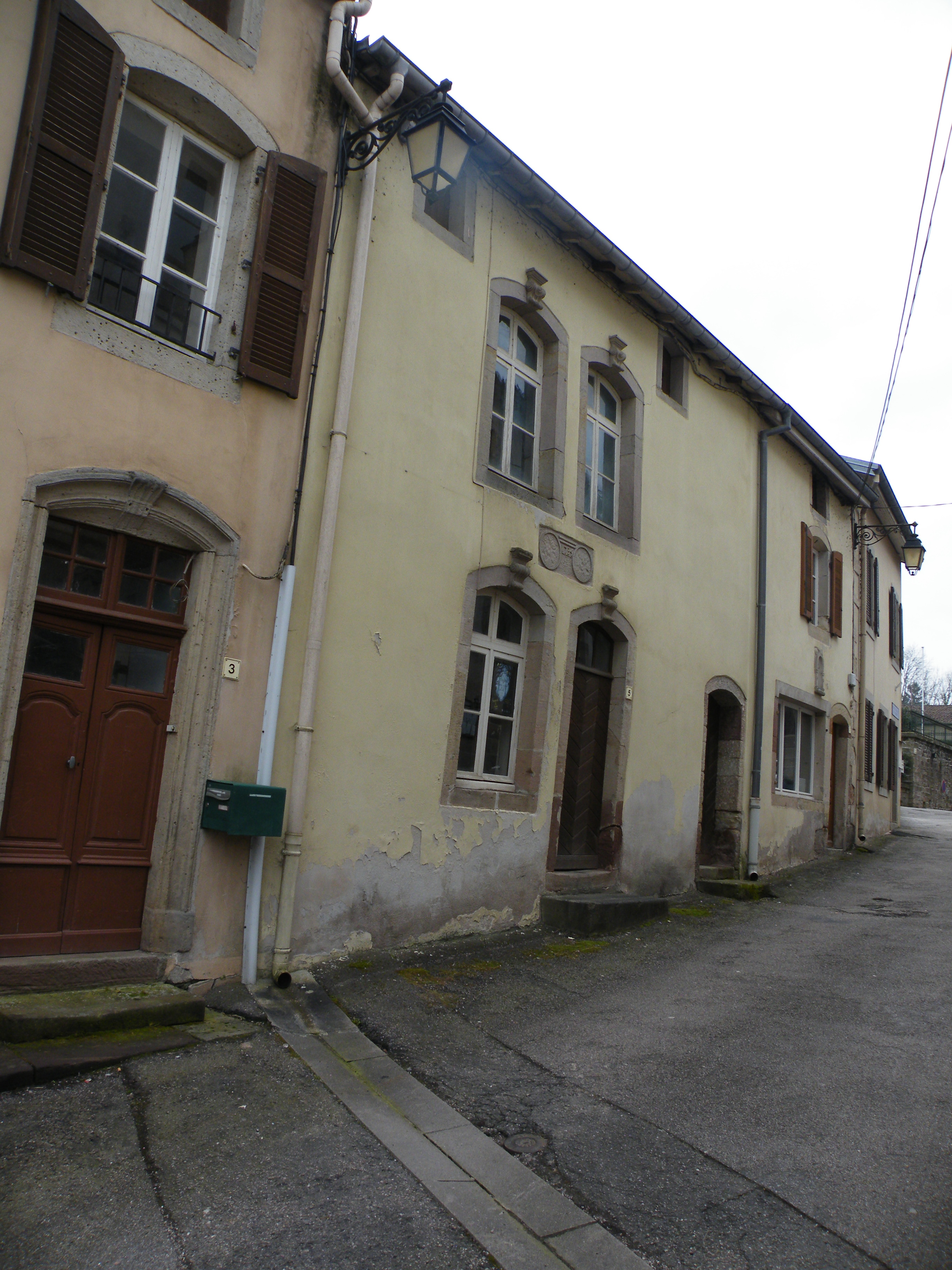 Maison d'école où se tenait l'école des filles début XIXe s. rue de l'église à Fontenoy-le-Château